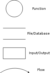 Data flow diagram notation.